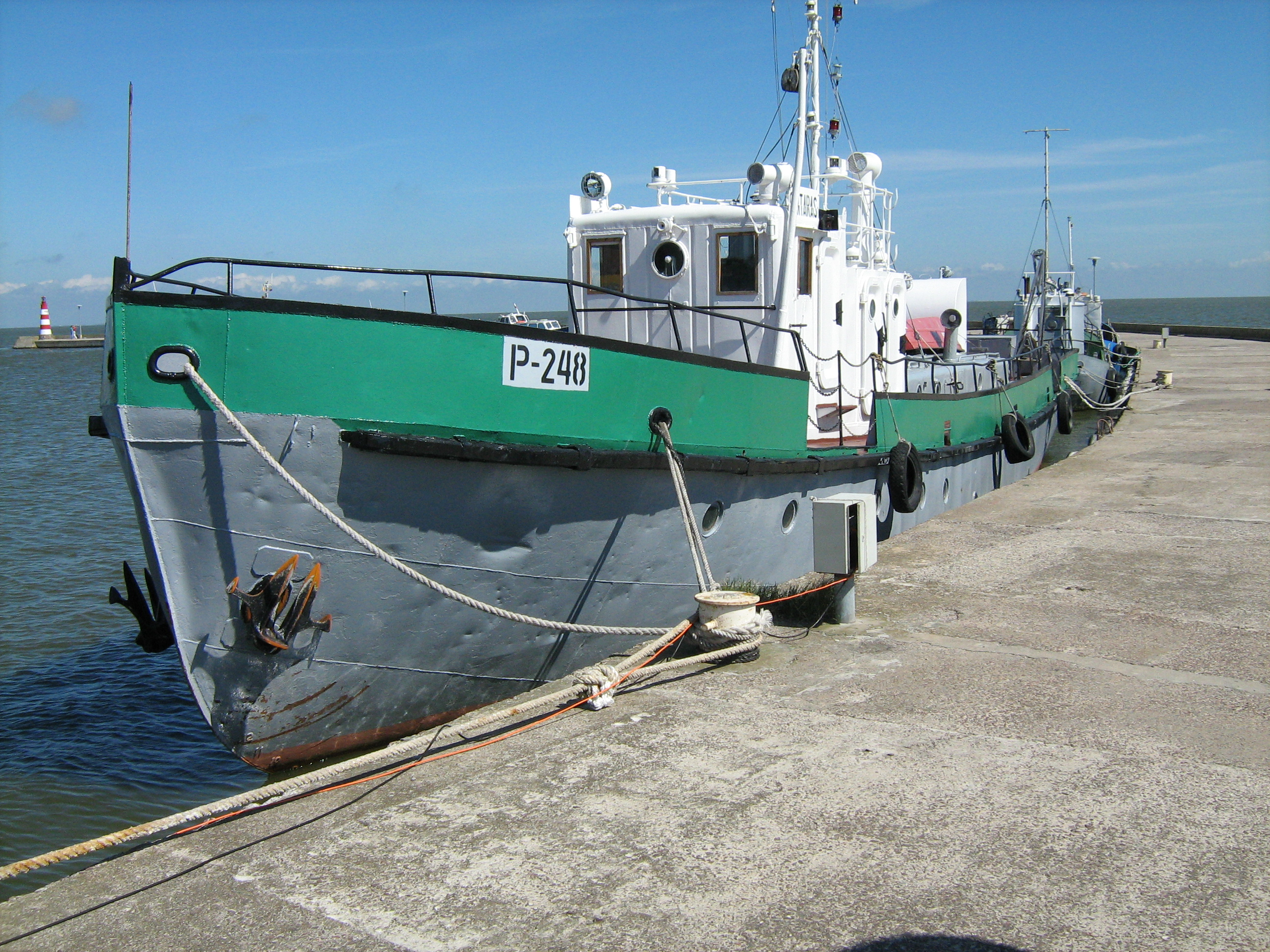 Laivas